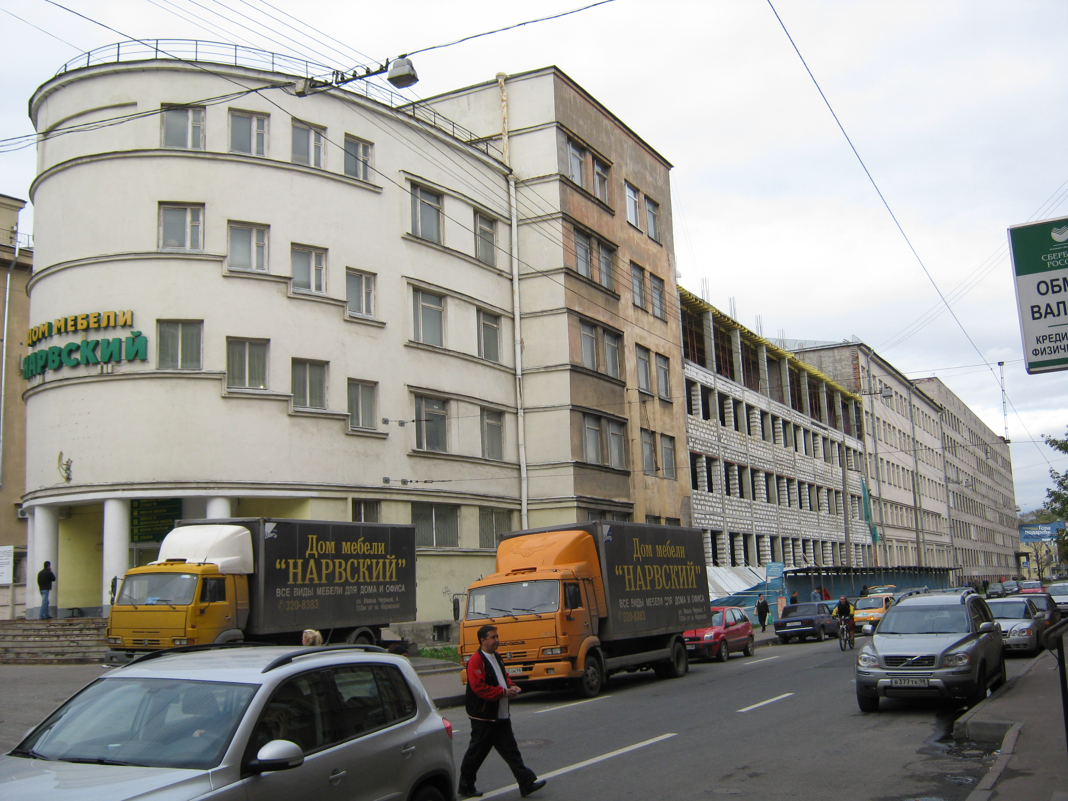 На фото запечатлено восстановление разрушенной части так называемого "Дома технической учебы" по адресу Санкт-Петербург, ул. Ивана Черных, д. 4. Здание является вновь выявленным объектом культурного наследия. Стиль - конструктивизм.